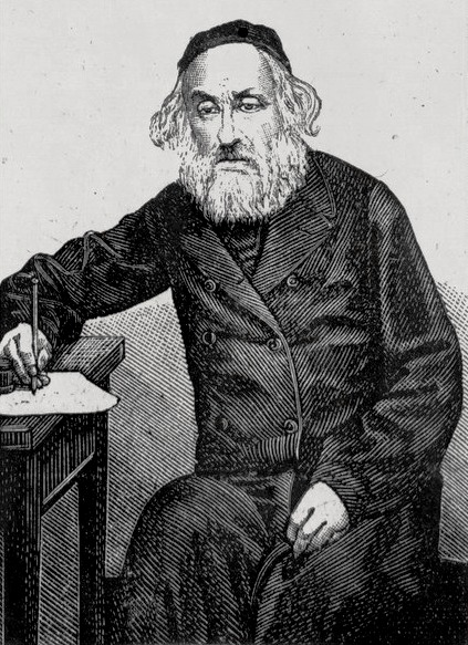 רפרודוקציה מתצלום דיוקנו של יעקב רייפמן: הדפס בגוני חום, מודבק על גבי כרטיס מעוטר בגודל 6.5X10.5 ס"מ. כפי הנראה, דיוקן זה הנו רפרודוקציה מתוך תצלום קבוצתי של סופרי "המליץ". בגב הכרטיס, נכתב בדיו: "מתנה מר' אליעזר בר"א צוקרמן לגנזי יוסף בירושלם". בתיק גם: רפרודוקציה מוגדלת של דיוקן זה, בשחור לבן. ; 2. תצלום רפרודוקציה מחיתוך עץ ובו דיוקן יעקב רייפמן. שחור לבן, 7X10 ס"מ. בגב התצלום צויין כי הוא הועתק מתוך כרך של "כנסת ישראל", ספר ג', ורשה, תרמ"ח, עמוד 176. על התצלום לא צויין תאריך הפקתו.